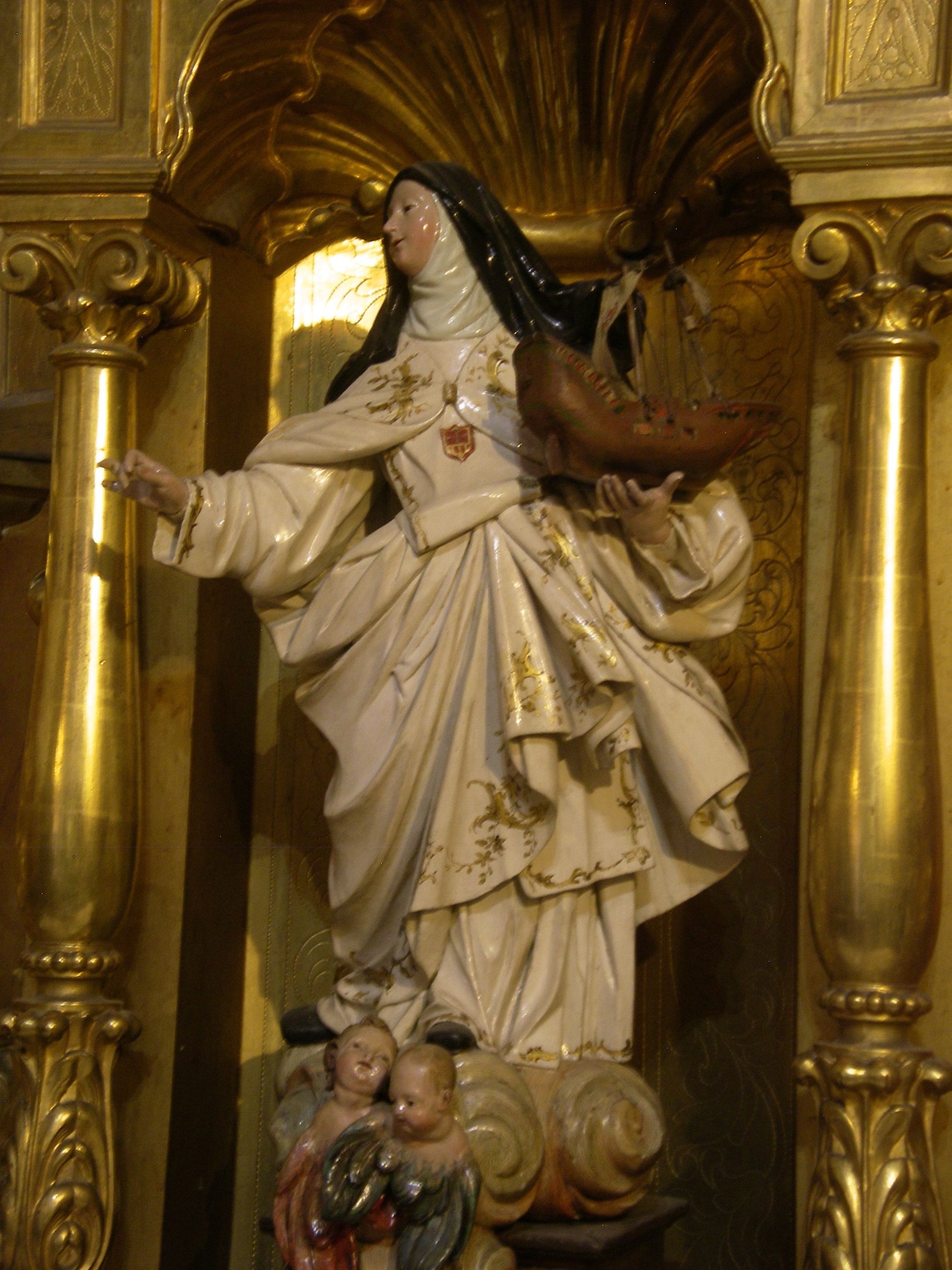 Imatge de Santa Maria de Cervelló, s. XVIII, a l'Església dels sants Just i Pastor de Barcelona